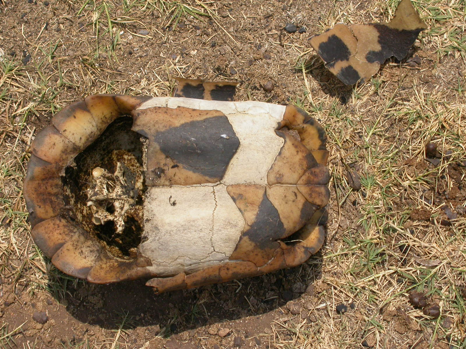 Carapace_di_Testudo_marginata,_femmina,_Lefkada,_agosto_2003